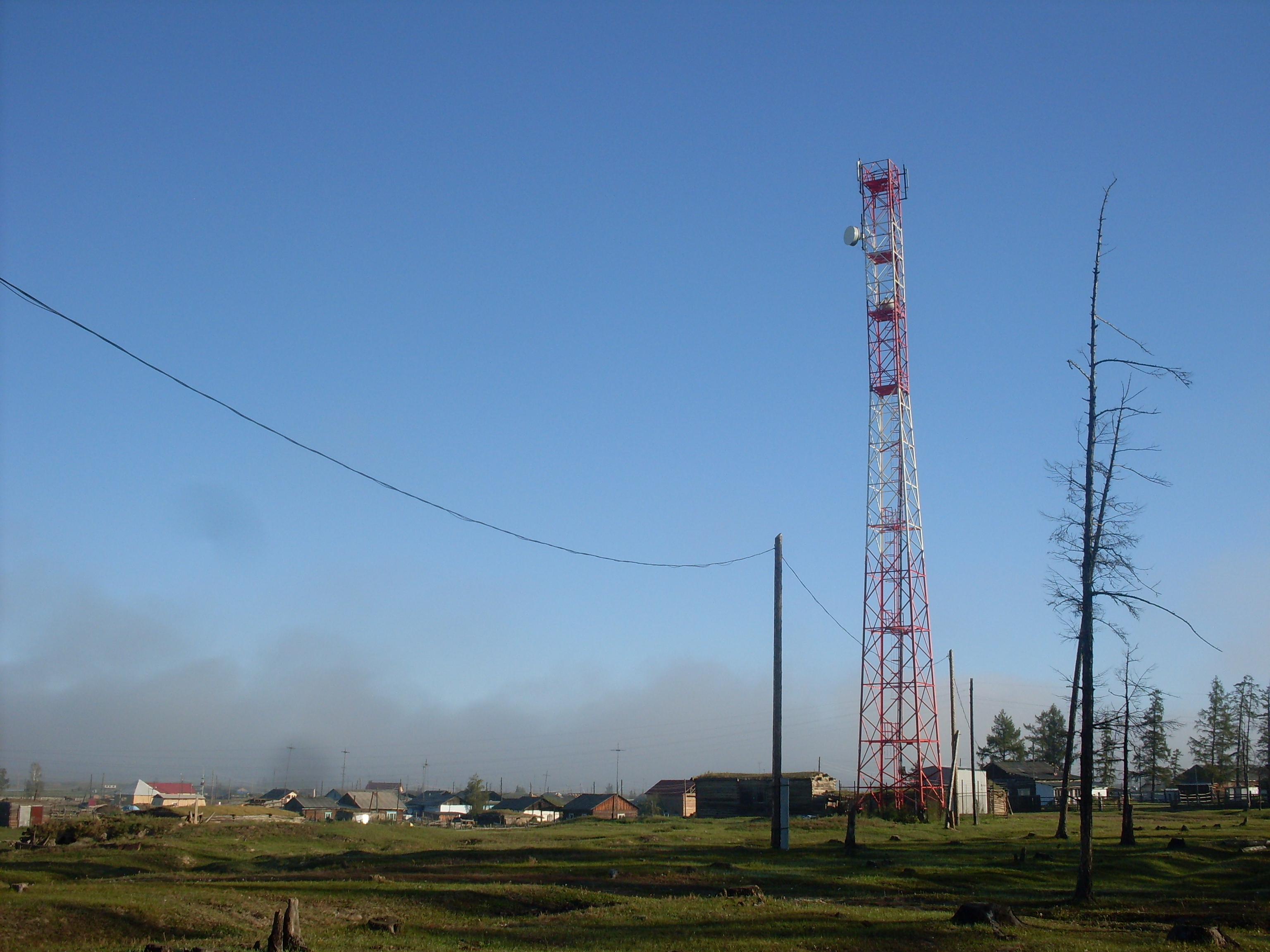 Антенна Билайн-оператора. с.Дябыла. Чурапчинский улус. РС(Я)